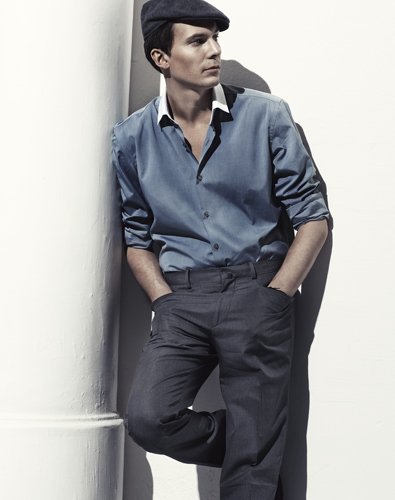 Håkan Hellström in Café Magazine.